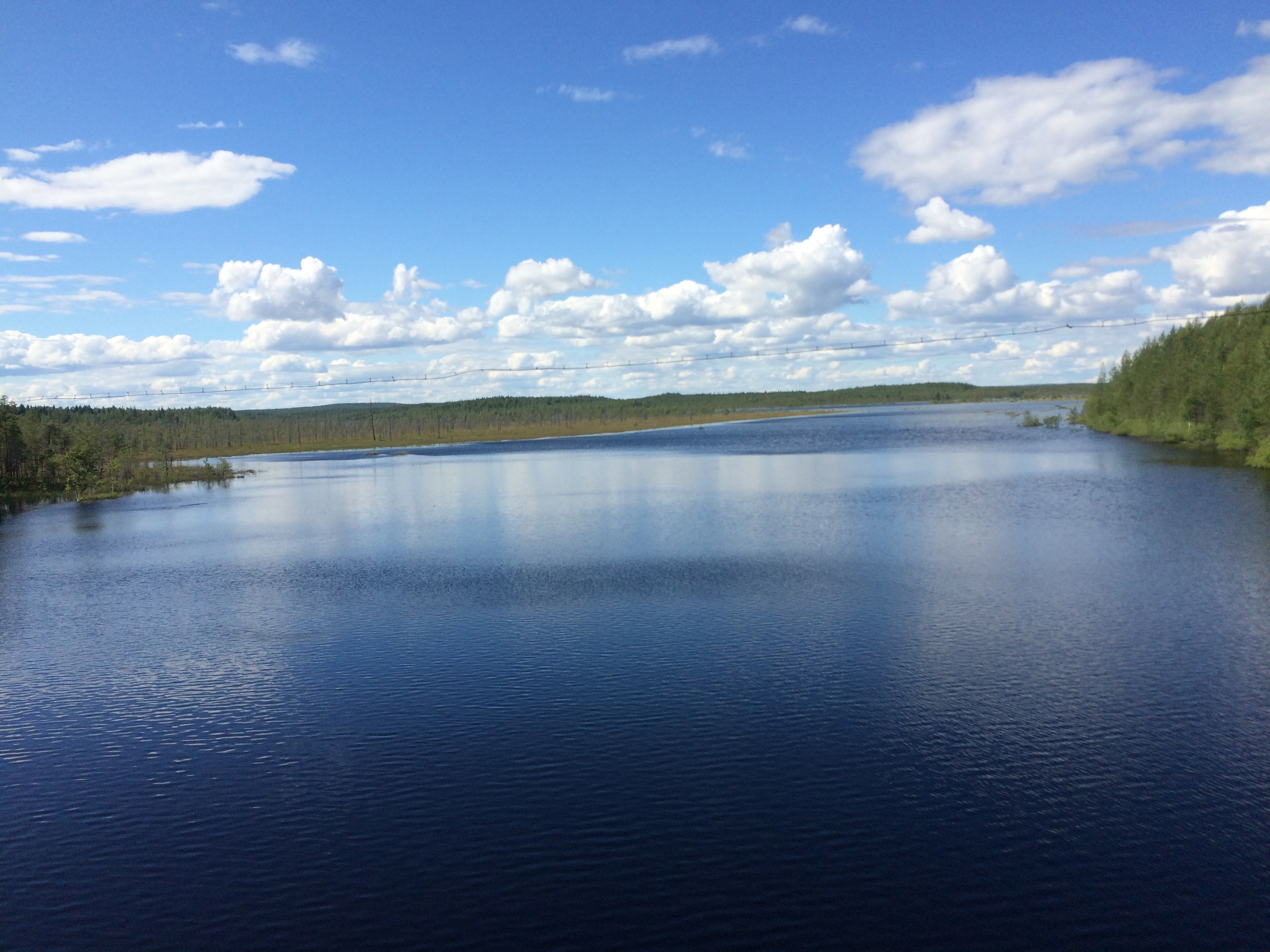 Кягма